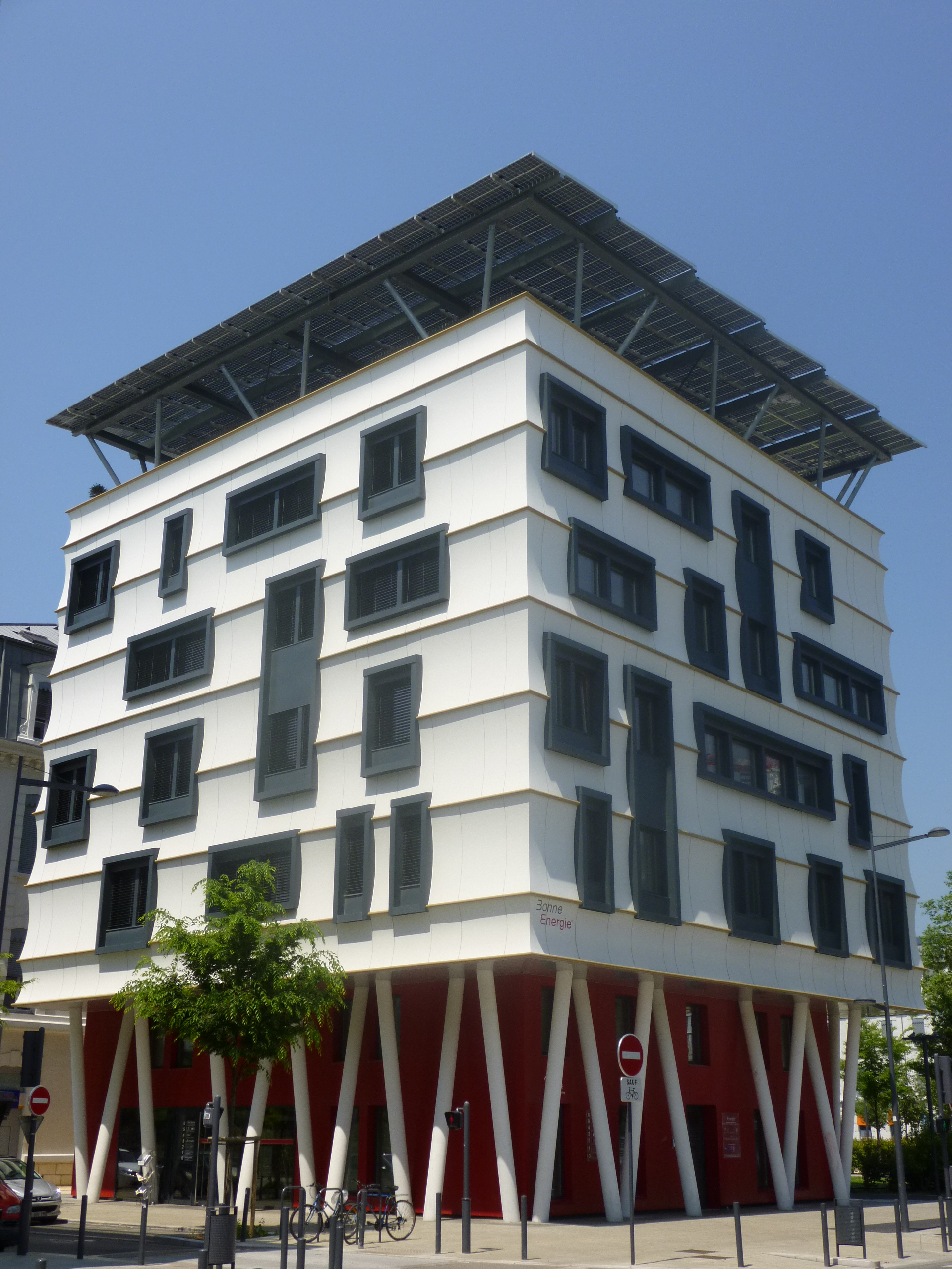 Immeuble à énergie positive "Bonne Energie", Grenoble.